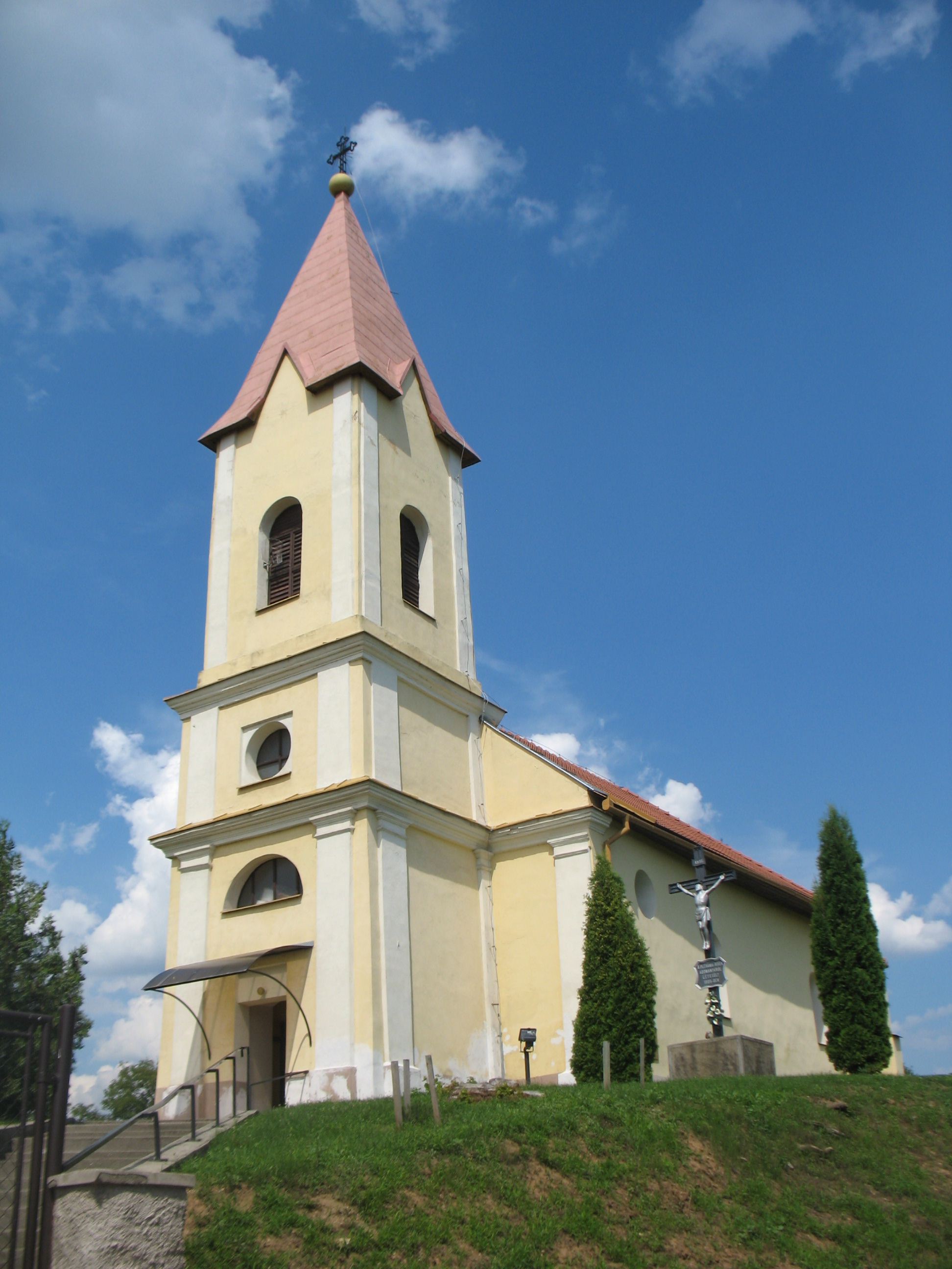 Csoltó